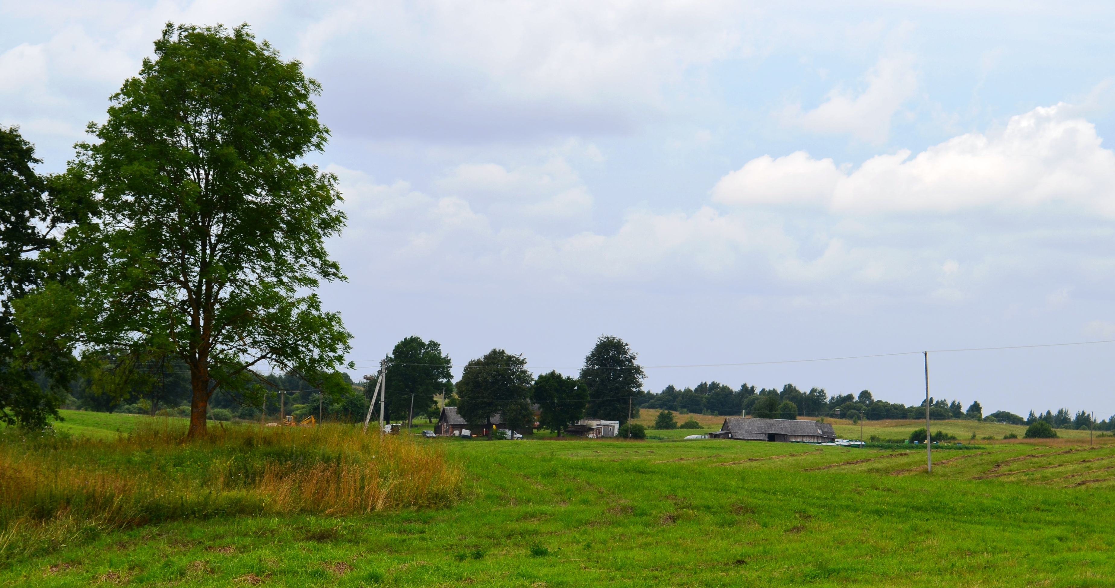 Zanėnai, Molėtų r.